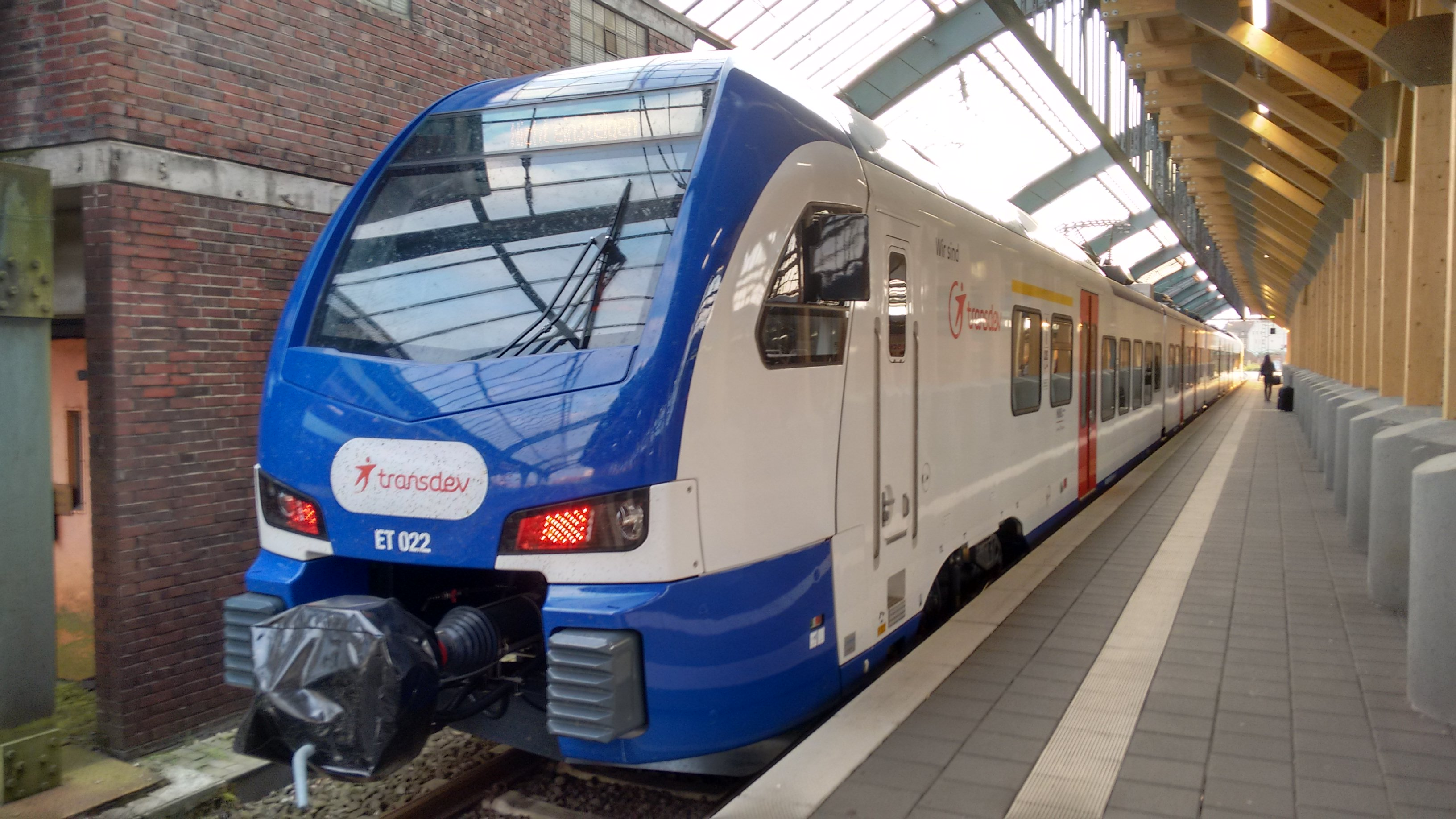 Stadler FLIRT 3 der NordWestBahn in neuer Transdev-Lackierung in Oldenburg (Oldenburg) Hauptbahnhof